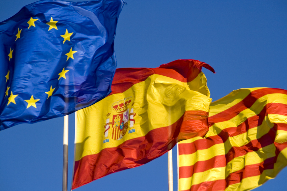 Bandera Nacional, de la Unió Europea, i l'autonòmica.